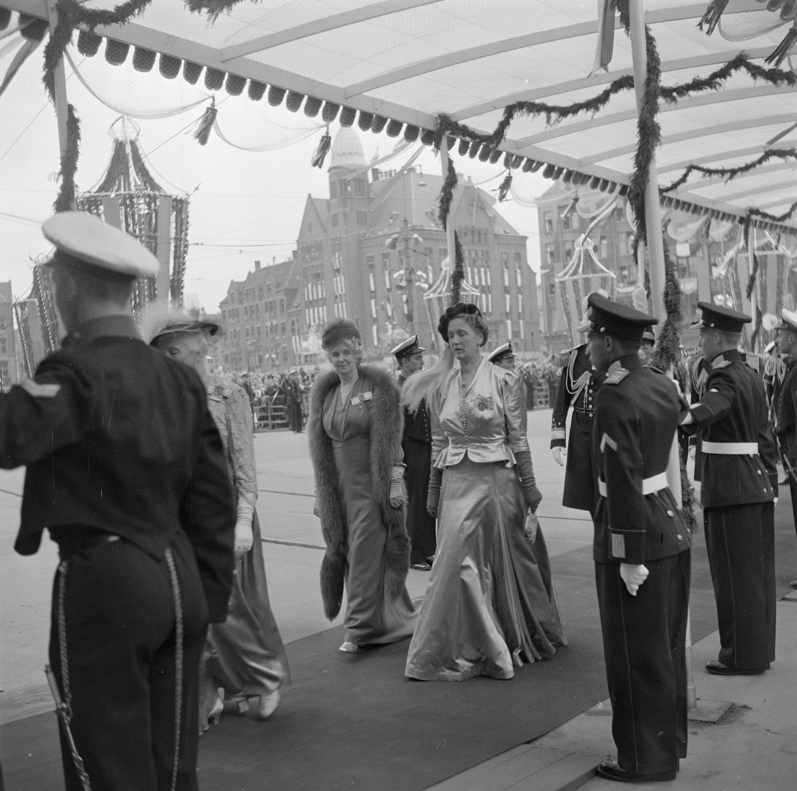 Troonsafstand koningin Wilhelmina / Inhuldiging van koningin Juliana. De koninklijke stoet onder de pergola, op weg van het paleis naar de Nieuwe Kerk. Leden van de Hofhouding: Geheel links (gedeeltelijk zichtbaar) de Grootmeesteres, C.M. baronesse van Tuyll van Serooskerken-jkvr. Boreel, gevolgd door mevrouw L. Verbrugge van 's Gravendeel-jkvr. Prisse (Dame du Palais) en jkvr. C.E.B. Röell (Hofdame, rechts). Maandag 6 sept. 1948, Amsterdam (Nederland)